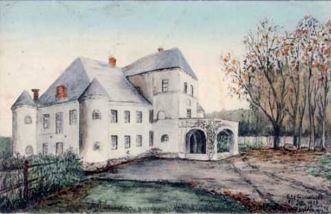 Беларуская (тарашкевіца): Гайцюнішкі (Hajciuniški). Замак